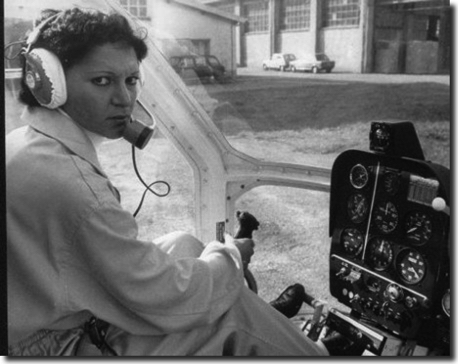 Maria Concetta Micheli sull'elicottero AB212. Anno 1978